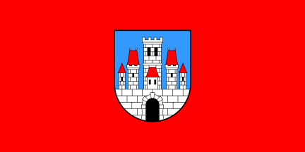 Vlag van Krapina.